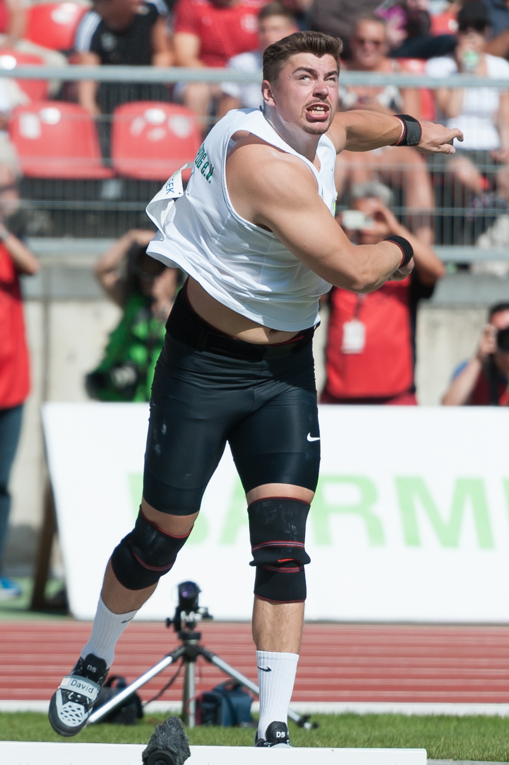 Deutsche Leichtathletik-Meisterschaften 2015: Männer Kugelstoßen - David Storl, SC DHFK Leipzig